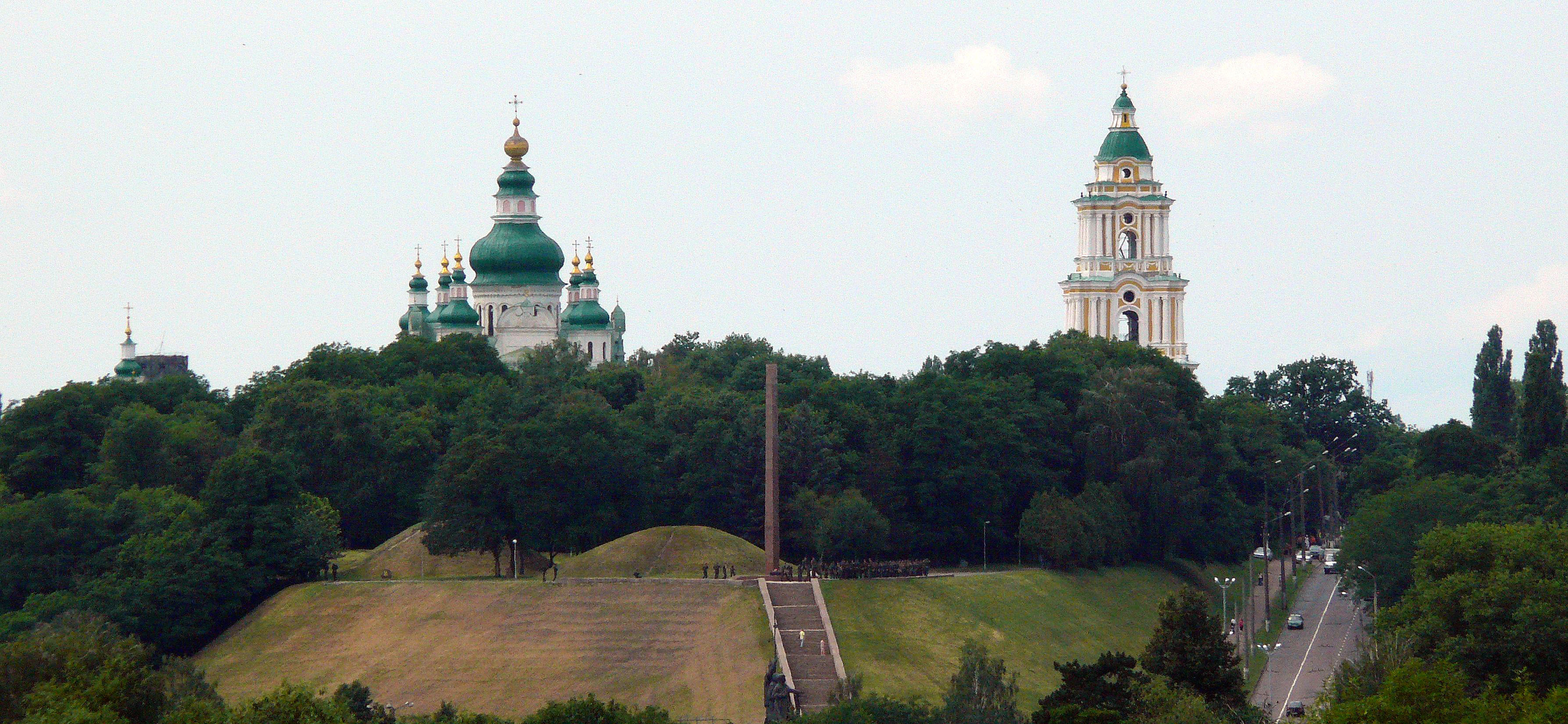 Местность города Чернигова, имеющая историческую, археологическую и культурную ценность. Расположена на возвышенности. Имеет объекты: Древнерусский курганный комплекс; Мемориальный комплекс, посвященный Великой отечественной войне; Религиозный - Троице-Ильинский монастырь; Парк и парковые объекты; Захоронения известных людей. Город Чернигов. Украина.